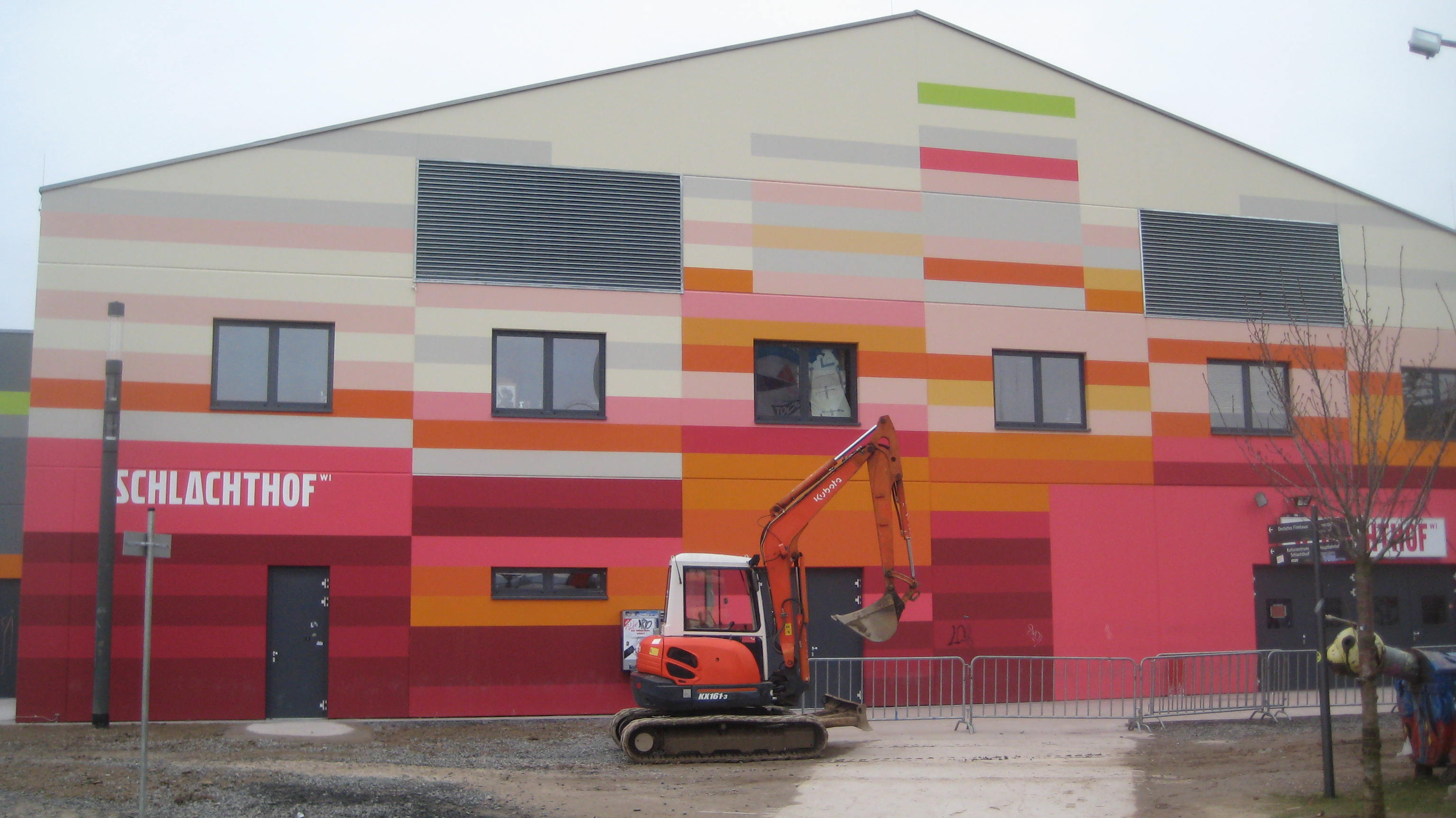 Kulturzentrum Schlachthof große Halle Nordseitengiebel, Neubau von 2012